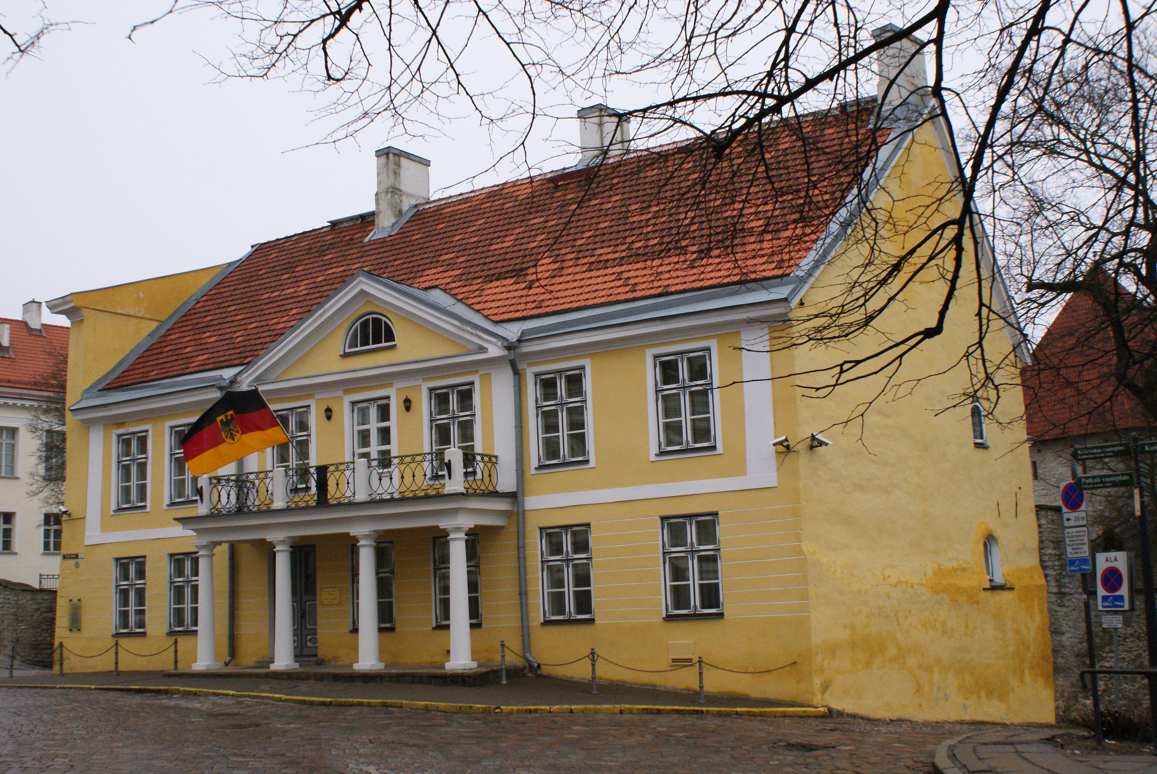 Saksa suursaadiku residents